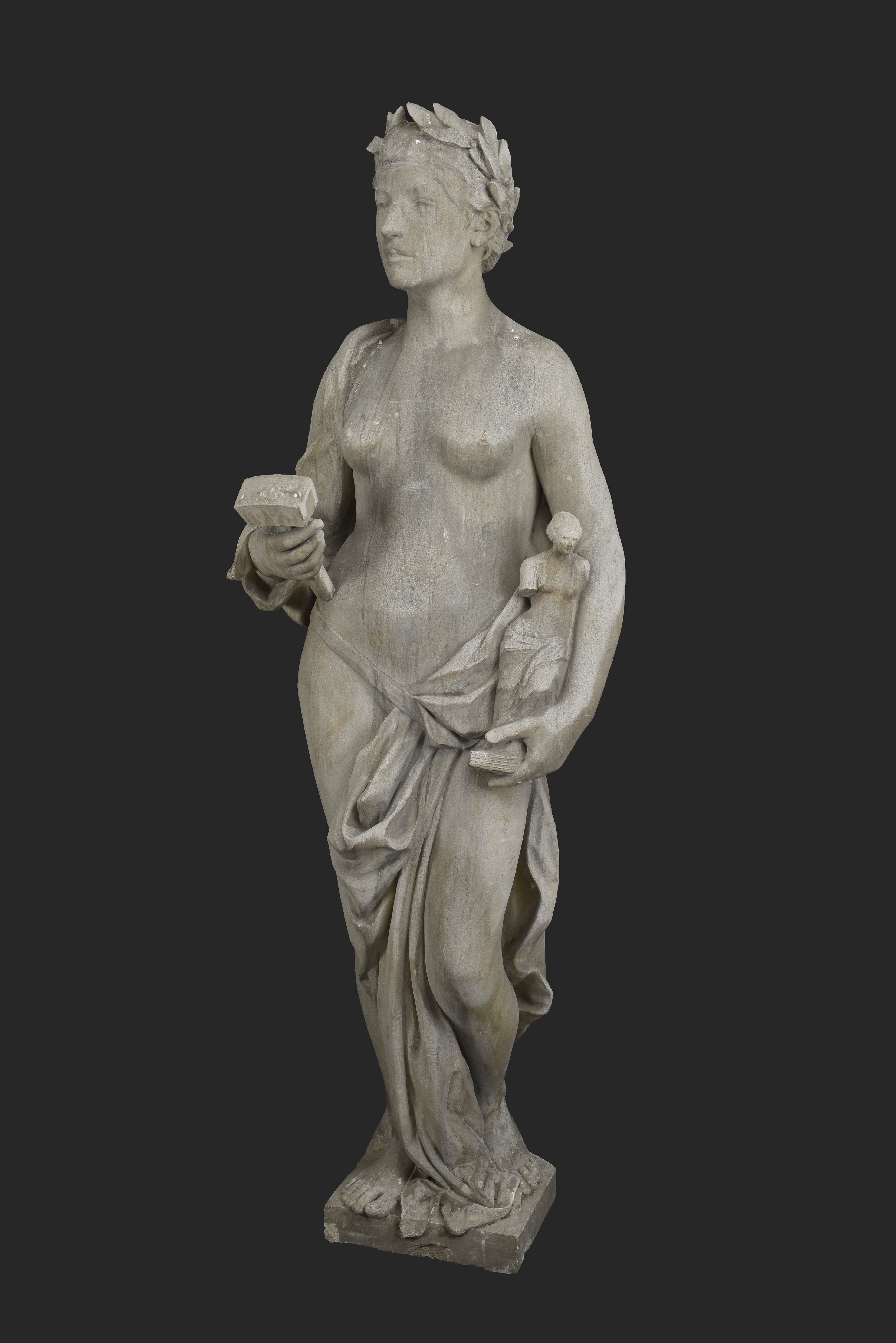 Objectgegevens Titel: Gevelbeeld, staande vrouw met hamer, beeld en lauwerkrans, personificatie van de Beeldhouwkunst Beschrijving: Zandstenen gevelbeeld, staande vrouw met hamer in de rechterhand, een klein beeldhouwwerk in de linker. Op het hoofd een lauwerkrans, om de rechterschouder en langs de benen een doek. De achterkant is onafgewerkt: hiermee stond het beeld vermoedelijk tegen een gevel. Herkomst: Vervaardigd voor de entree van het Schielandshuis. Trefwoorden: gevelbeeld, beeldhouwwerk, , gebouwonderdeel Opschrift / merk: Op sokkel, ingehakt: "Keller". Vervaardiger: Johan Keller (Den Haag 1863 - Den Haag 1944) Datering: 1894 Technieken: gebeeldhouwd Materiaal: zandsteen, steen Afmetingen: (cm) hg 188,0 / br 65,0 / dp 49,0 / circa 340 kg Associatie: beeldhouwkunst, Rotterdam, Stadscentrum, Stadsdriehoek, Korte Hoogstraat, Schielandshuis Vorm & decoratie: figuur, vrouw, lauwerkrans, hamer, beeld Inventarisnr: Museum Rotterdam 35240